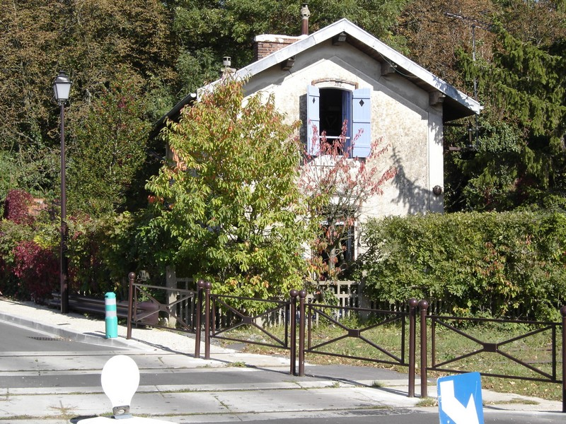 Vue de la halte-gare de Bailly.